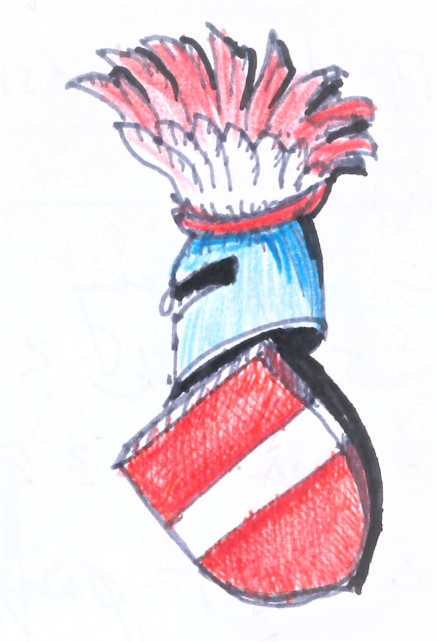 Erb Dubečských z Dubče, který vycházel ze staršího podkladu patricijského rodu Velfloviců